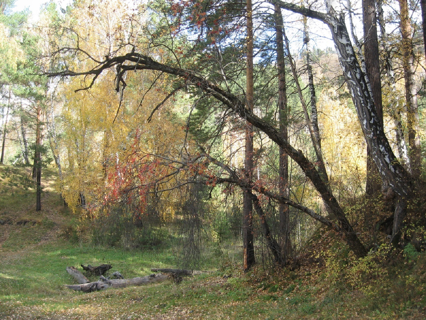 Смешанный лес осенью, Алтайский край.